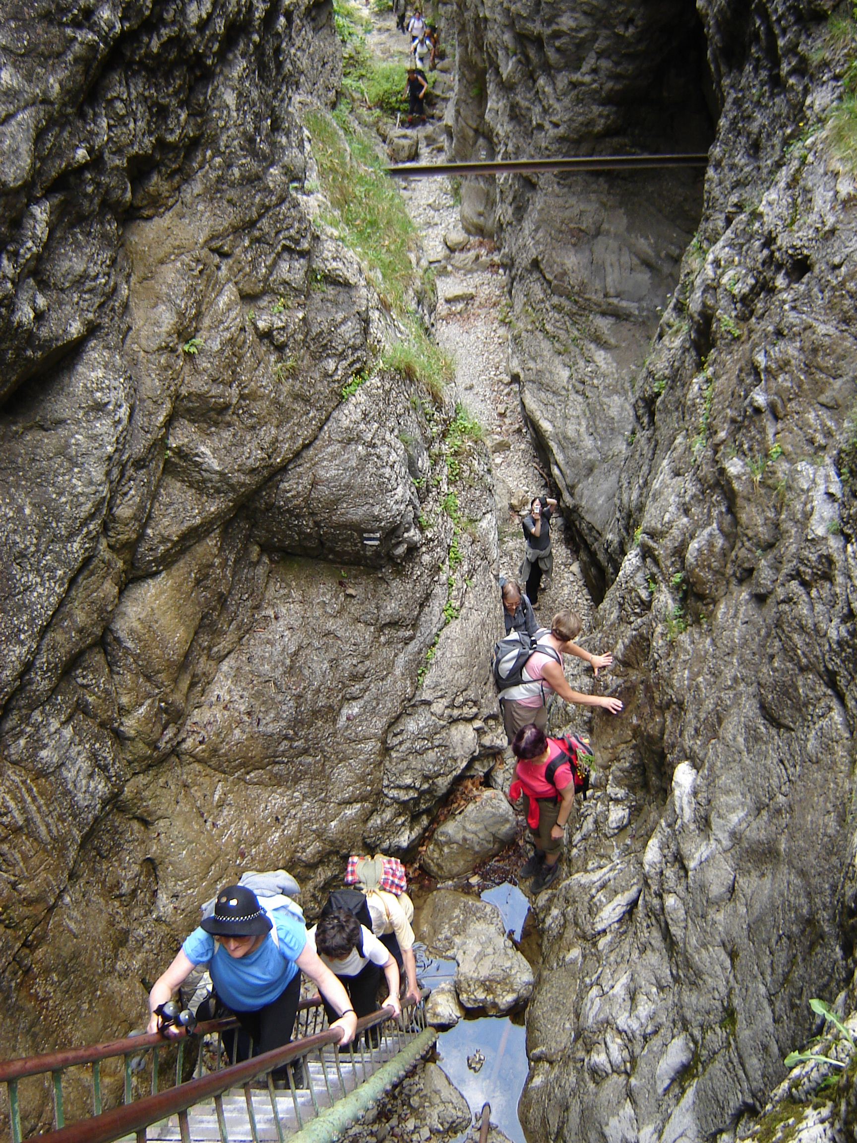 Turisti na rebríkoch